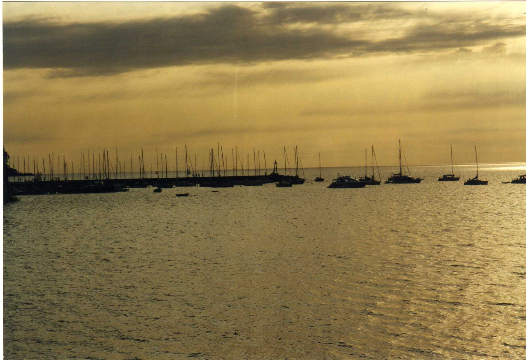 Vista del Río de la Plata, desde muelle de Colonia del Sacramento, Uruguay.